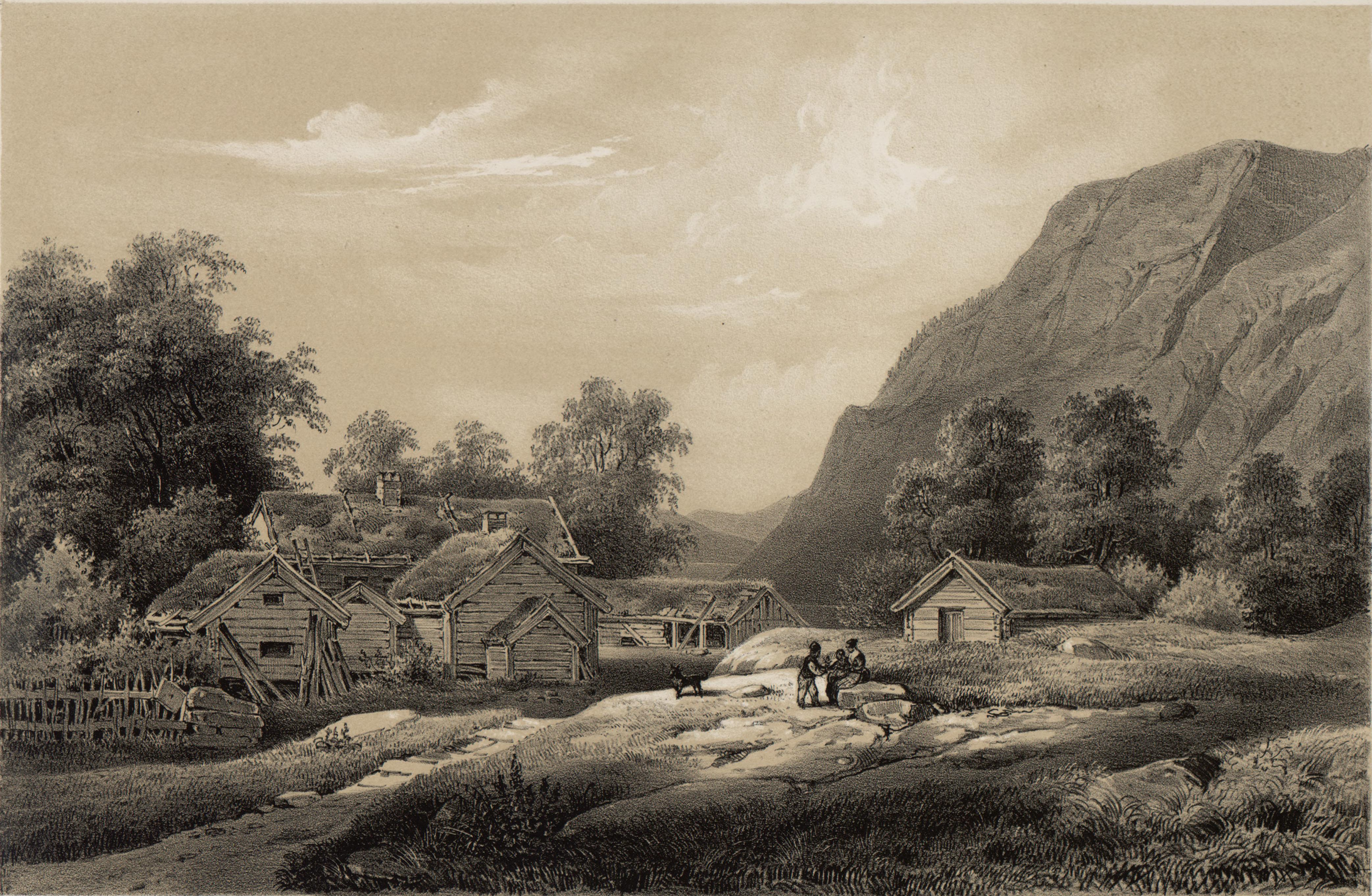 Davigens præstegaard i Nordfjord, Calmeyer del. C. Müller lith. Em. Bærentzen & Co lith Inst. Illustrasjon hentet fra boken "Norge fremstillet i Tegninger" av Asbjørnsen, P.Chr. og utgitt av Chr. Tønsberg (no, 1848)